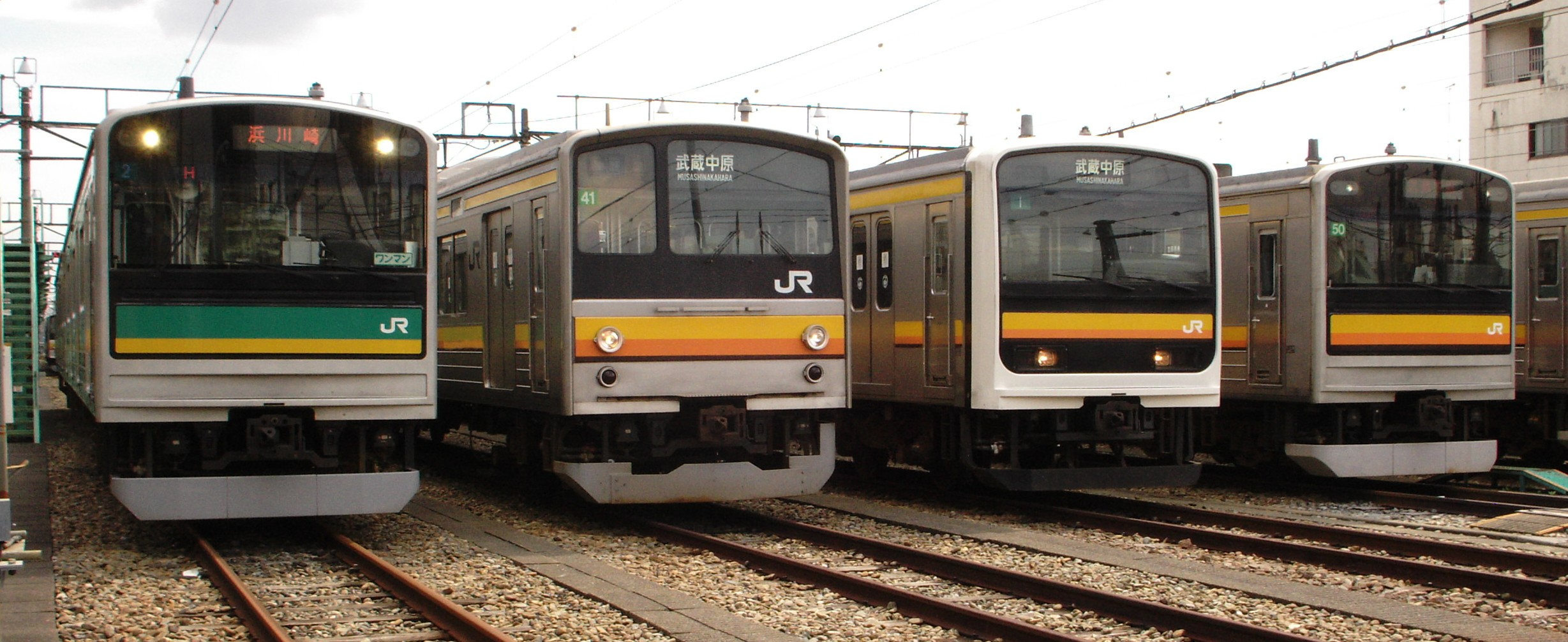 2006/09/16 中原電車区で投稿者撮影 Category:鉄道列車画像 Category:東日本旅客鉄道の画像